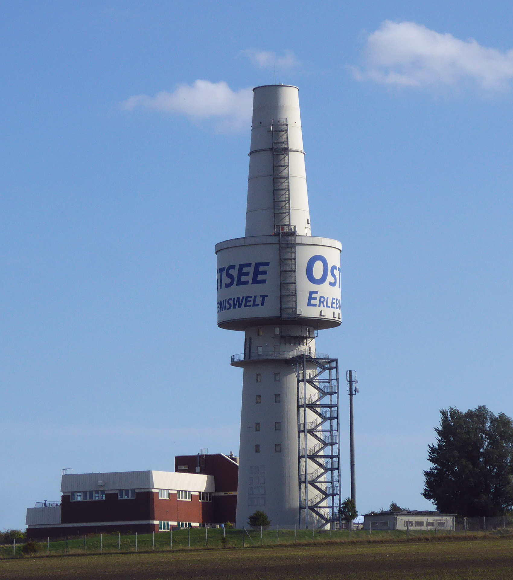 Klaustorf Holstein Ostsee Erlebniswelt nahe Großenbrode Meereszentrum Fehmarn ehemalig BW-Aufklärungsturm - Foto 2018 © Wolfgang Pehlemann P1270482